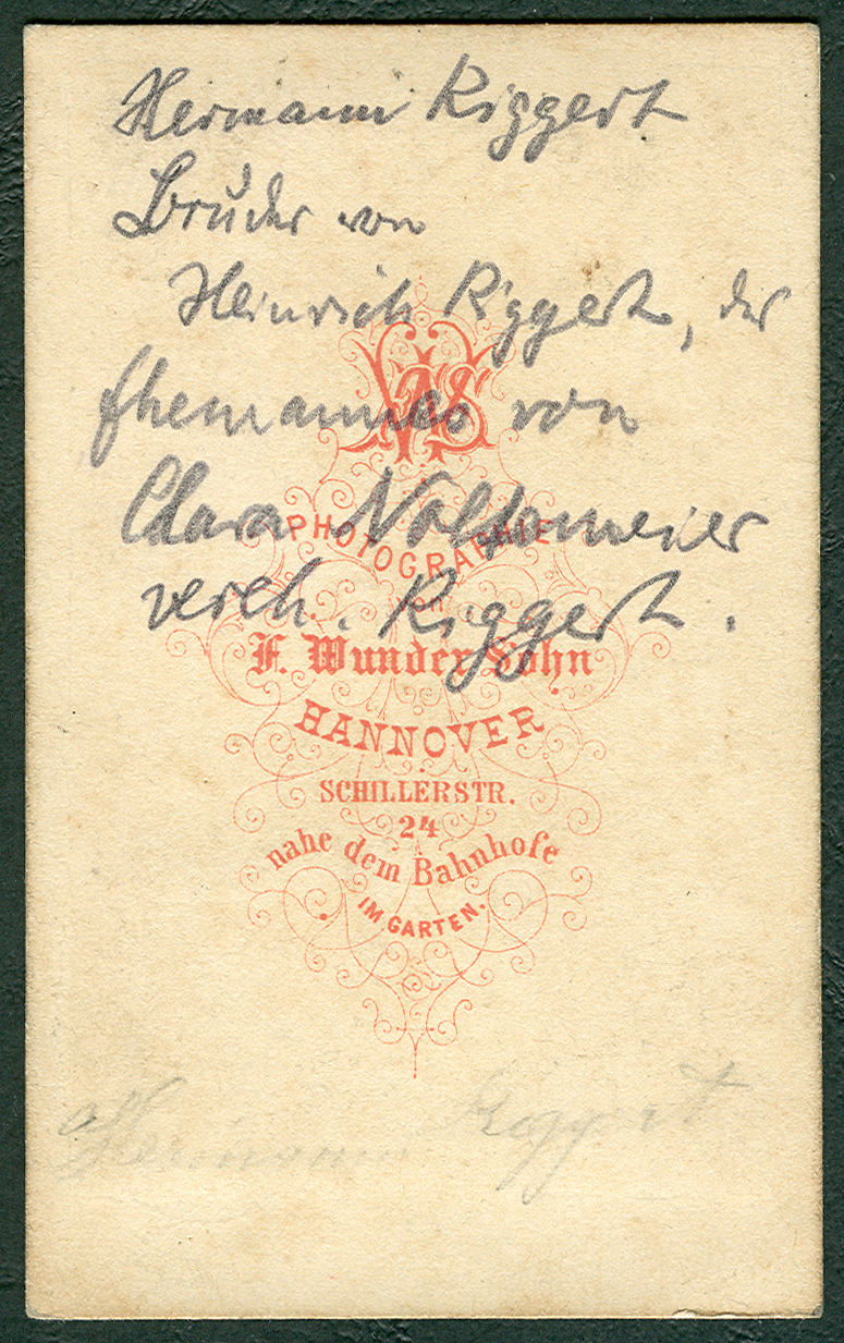 Rückseite einer Carte de Visite von Otto Wunder, Abschrift: "FWS / Photographie / von / F. Wunder Sohn / Hannover / Schillerstr[aße] / 24 / nahe dem Bahnhofe / im Garten".